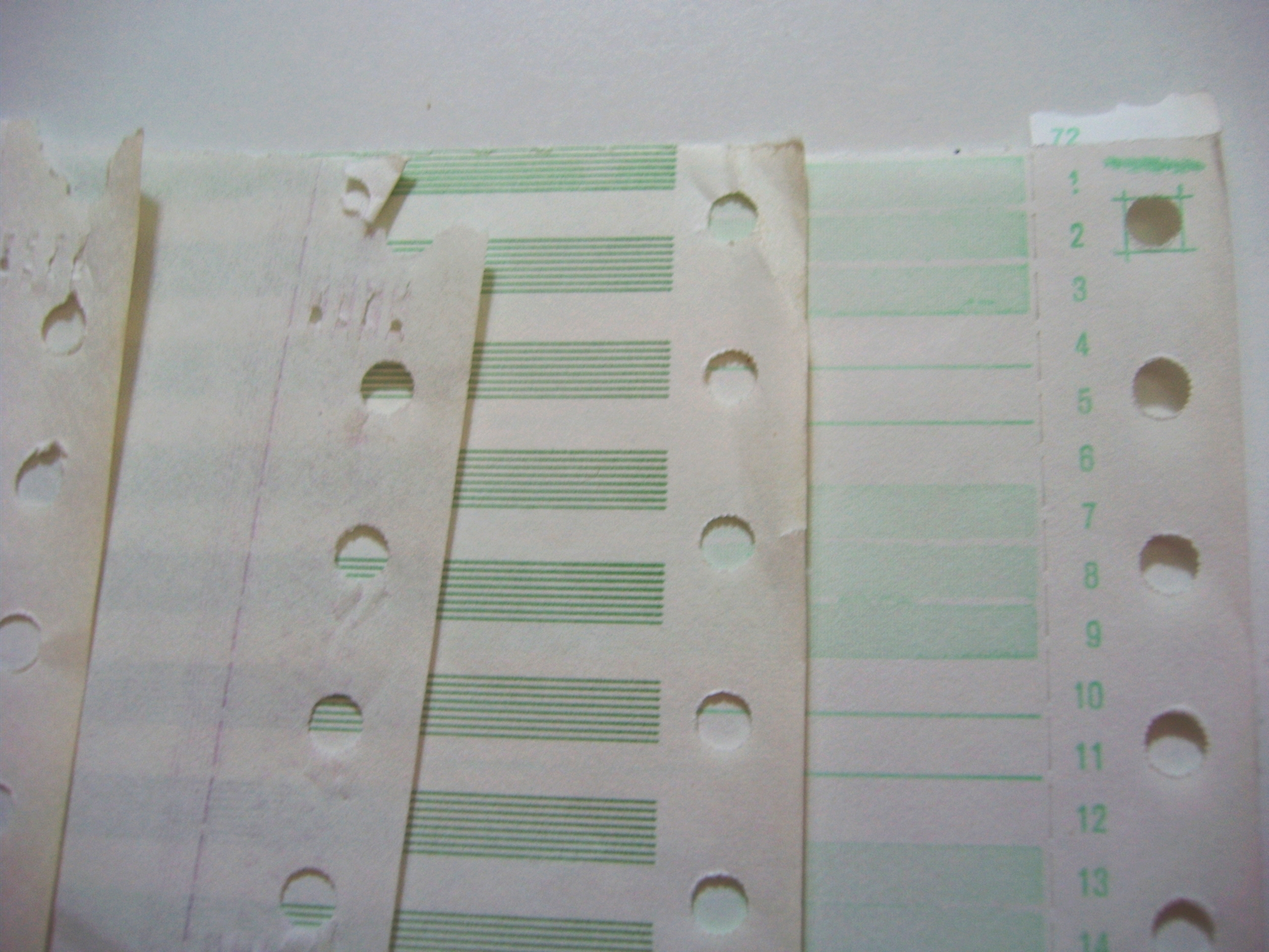 Continuous stationery, Endlospapier links mit Durchschlagskopie